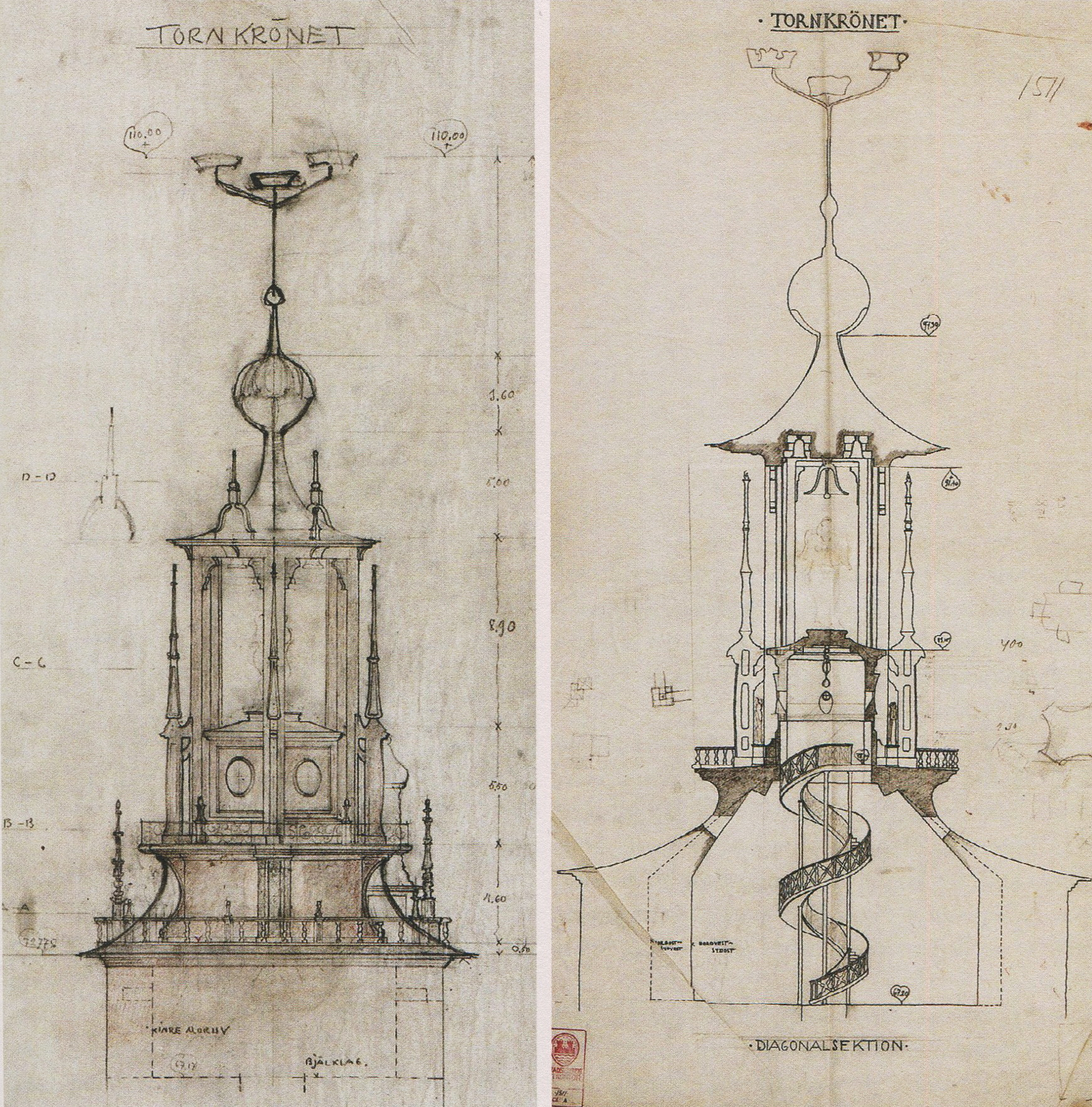 Stockholms stadshus, tornskisser